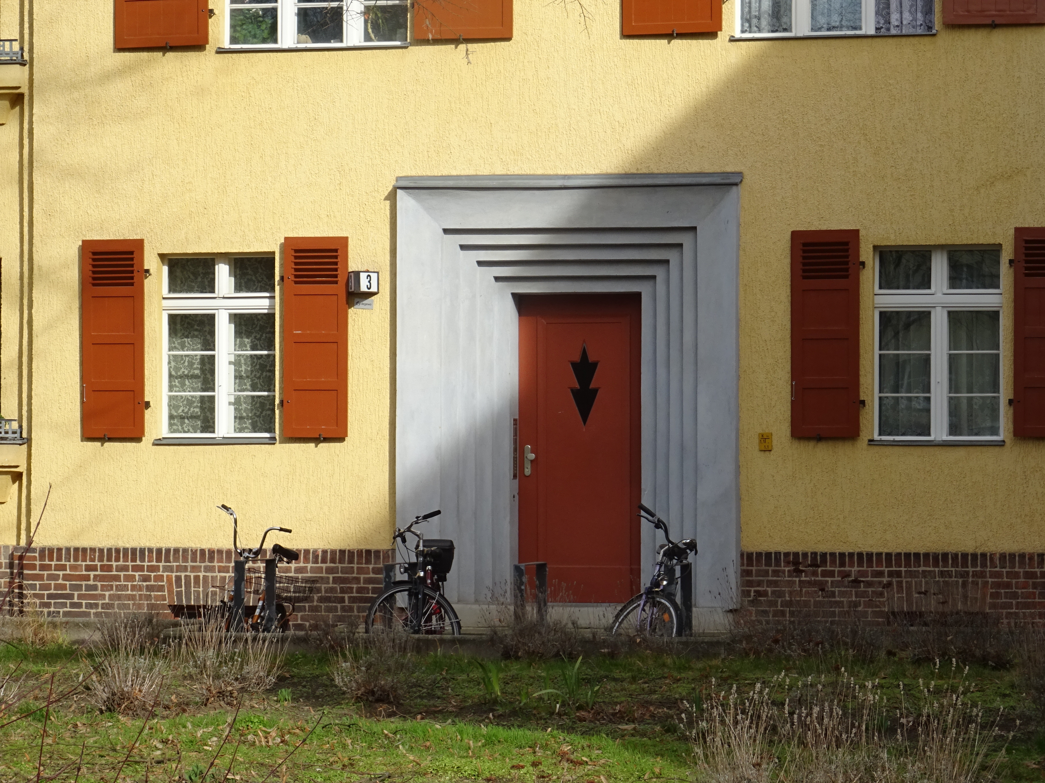 Berlin-Oberschöneweide, denkmalgeschützte GEBAG-Siedlung, Fontanestraße 3, Detail